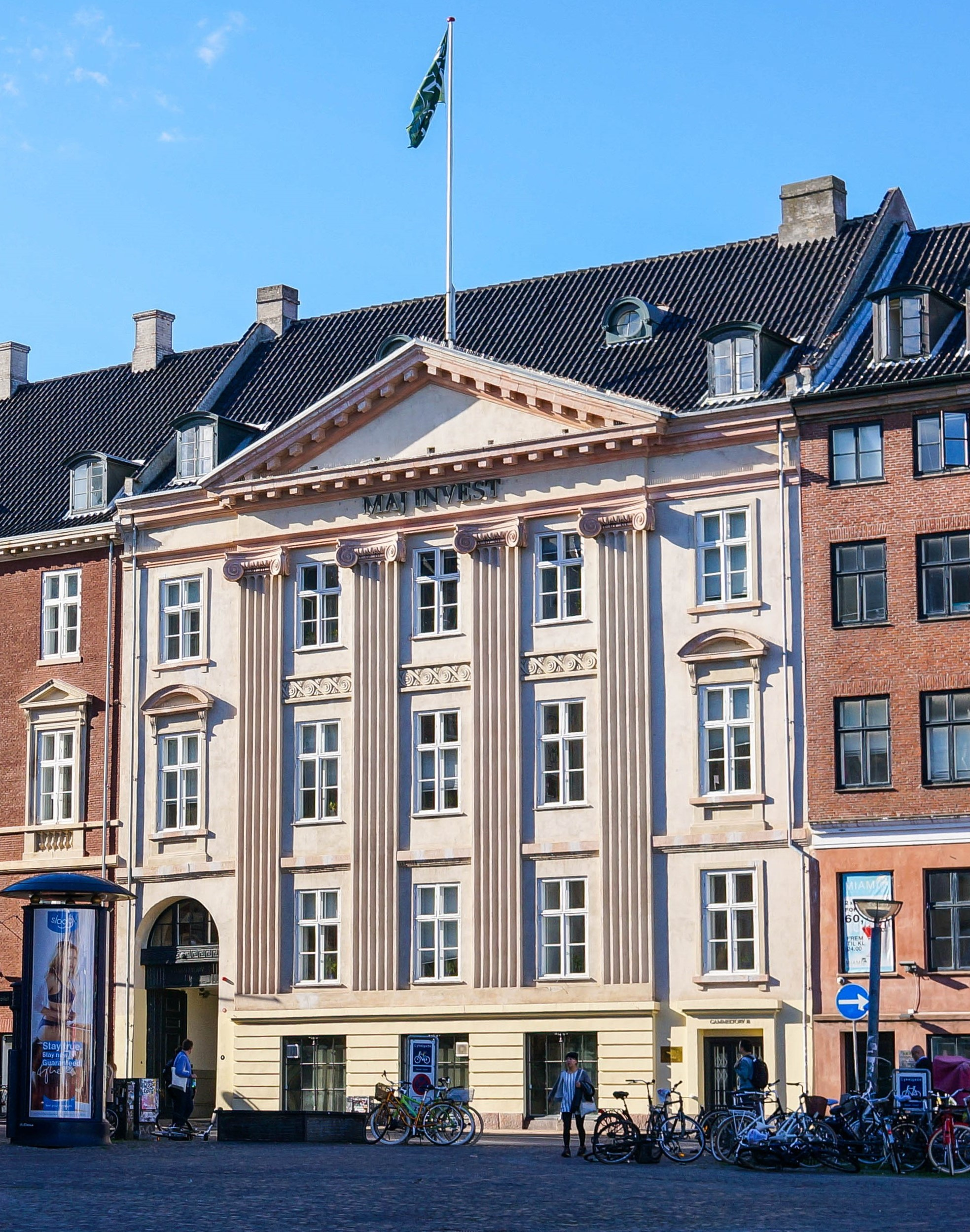 Gammeltorv 18 in Copenhagen, Denmark